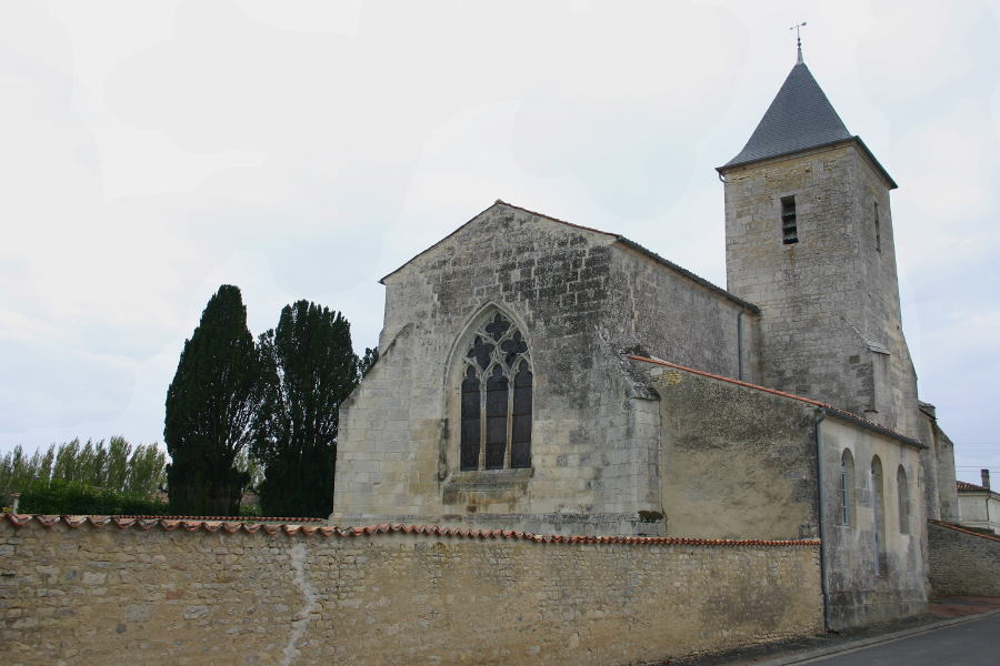 Église Saint-Hilaire de Nantillé